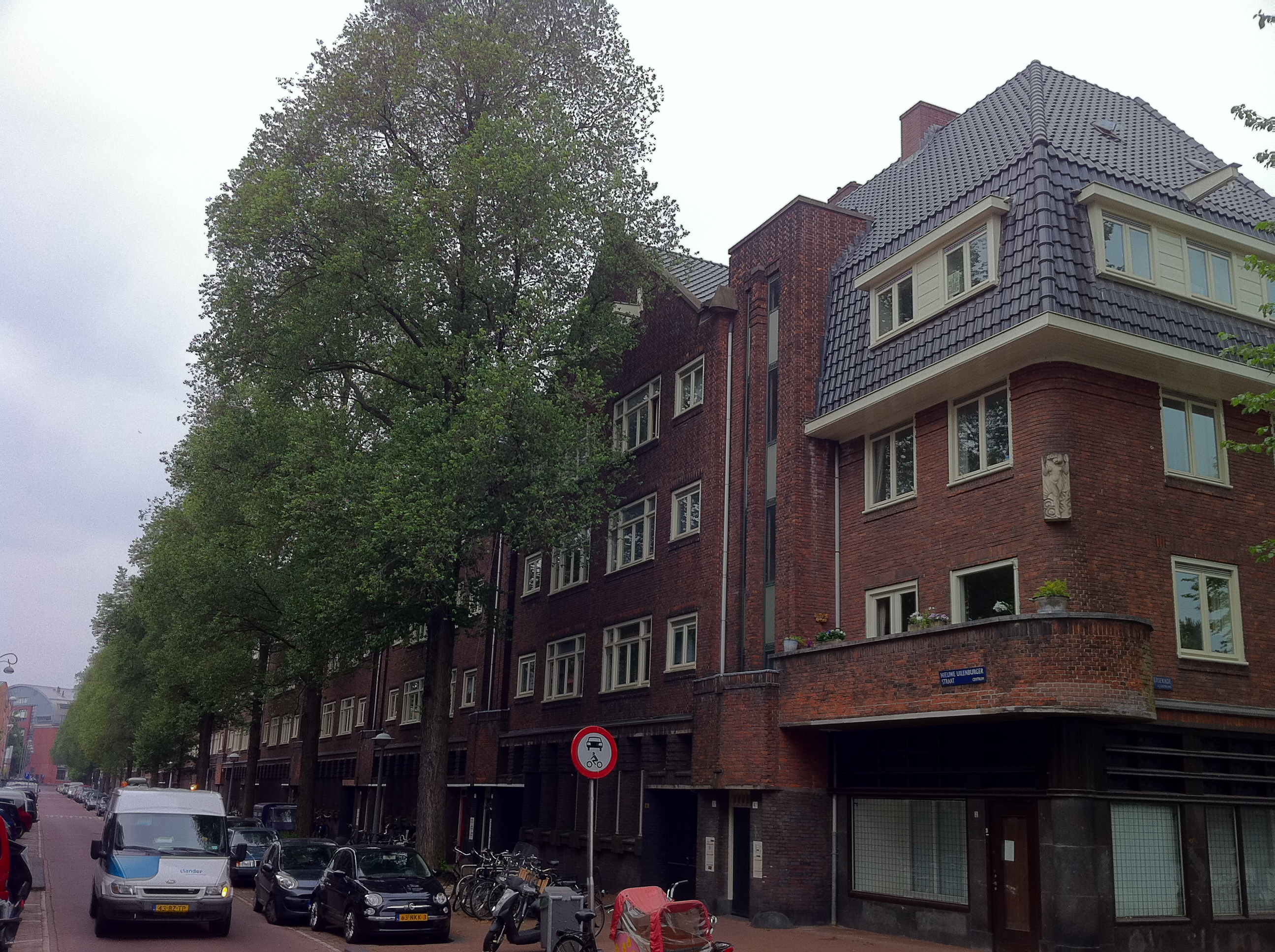 Arbeiderswoningen van het Bouwfonds Handwerkers Vriendenkring aan de Nieuwe Uilenburgerstraat te Amsterdam